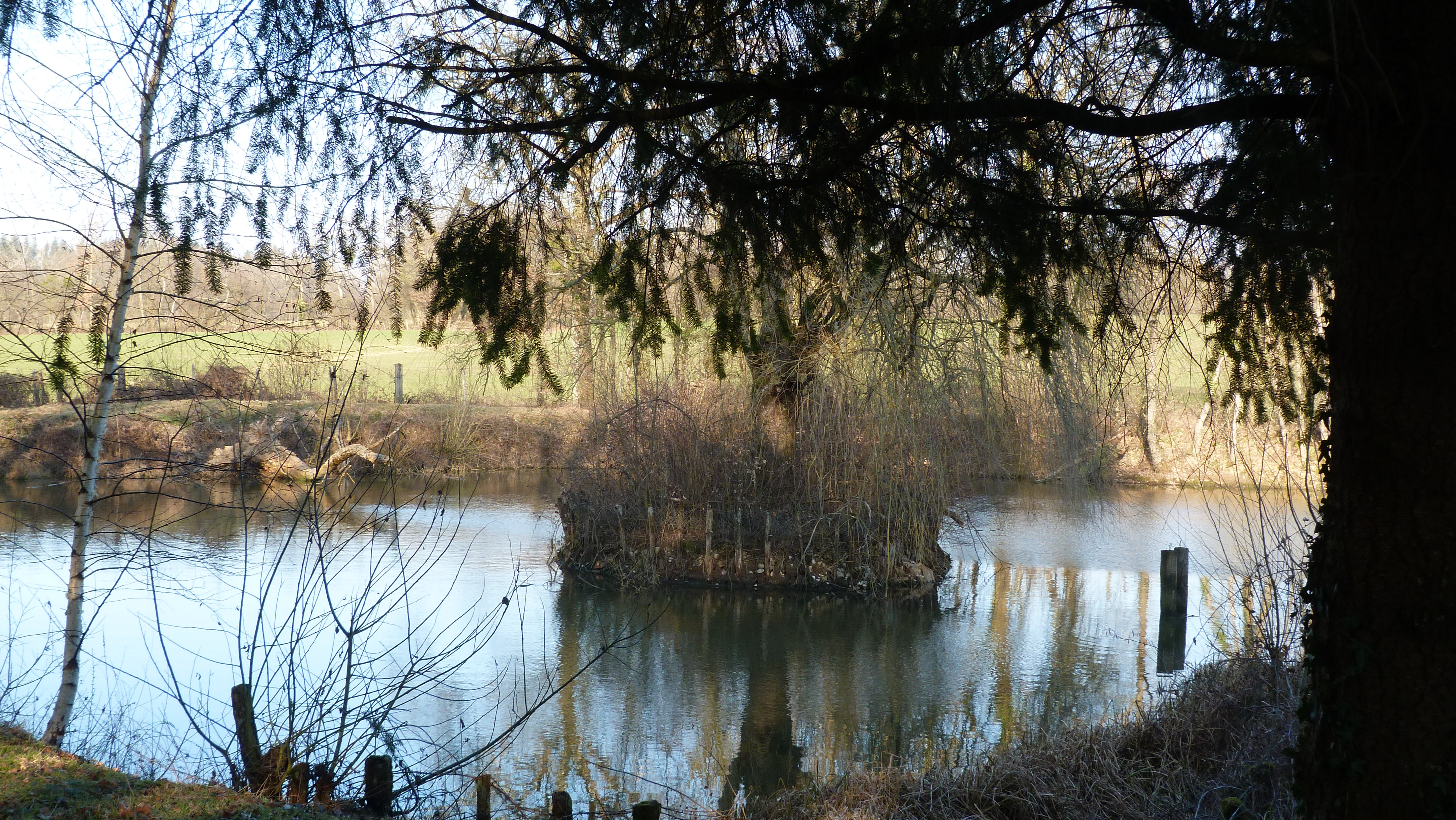 Le Fay un étang